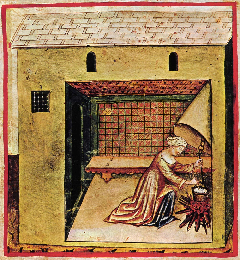 Tacuina sanitatis (XIV century) -lavorazione prodotti vegetali,Taccuino Sanitatis, Casanate